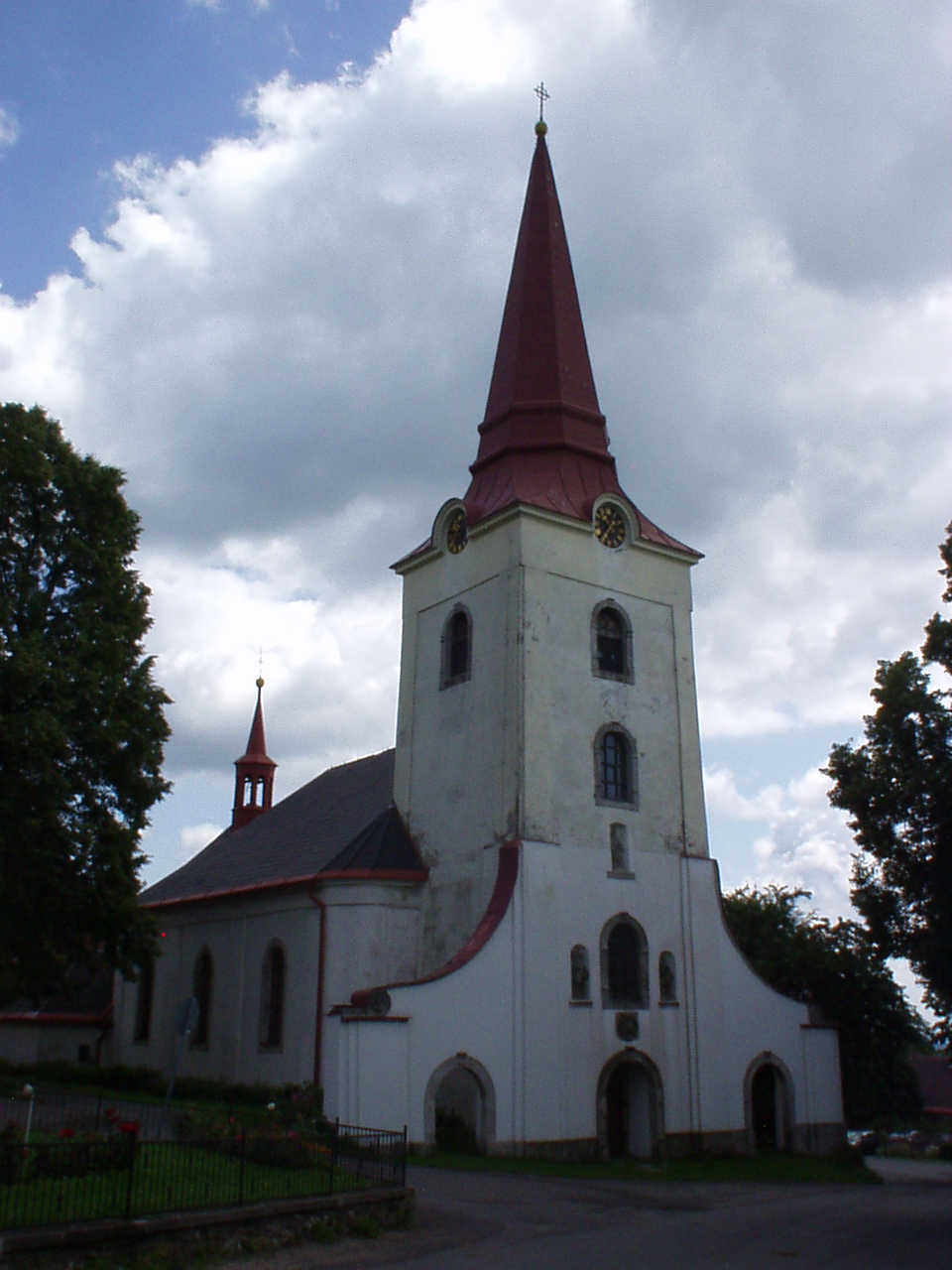 kostel sv. Mikuláše ve Světlé pod Ještědem - vchod